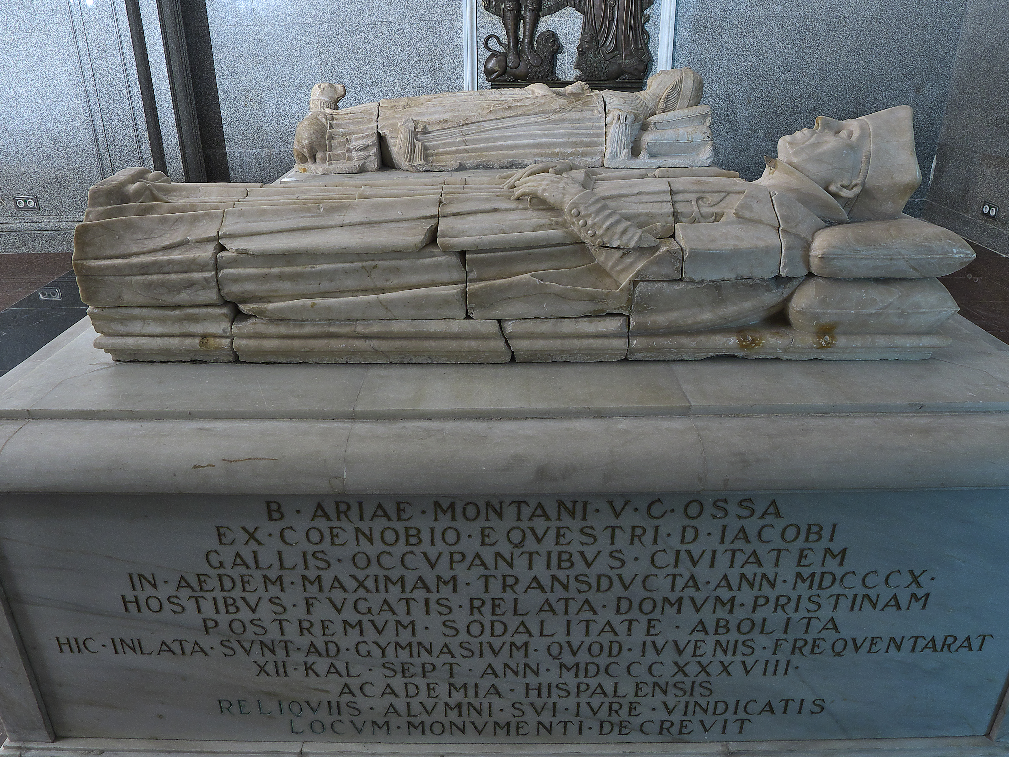 Vista lateral con la siguiente inscripción: Aquí reposan los restos de Benito Arias Montano, los que en 1810, ocupan el Convento de Caballeros de Santiago por los franceses que se apoderaron de esta ciudad, se llevaron a su iglesia Catedral, y libre ya de enemigos se trasladaron a su anterior sepulcro. Extinguidos los regulares, fueron conducidos a este sitio, casa de estudios que frecuenta cuando joven, en 12 de las kalendas de septiembre, año de 1838, por disposición del Claustro Universitario de Sevilla.